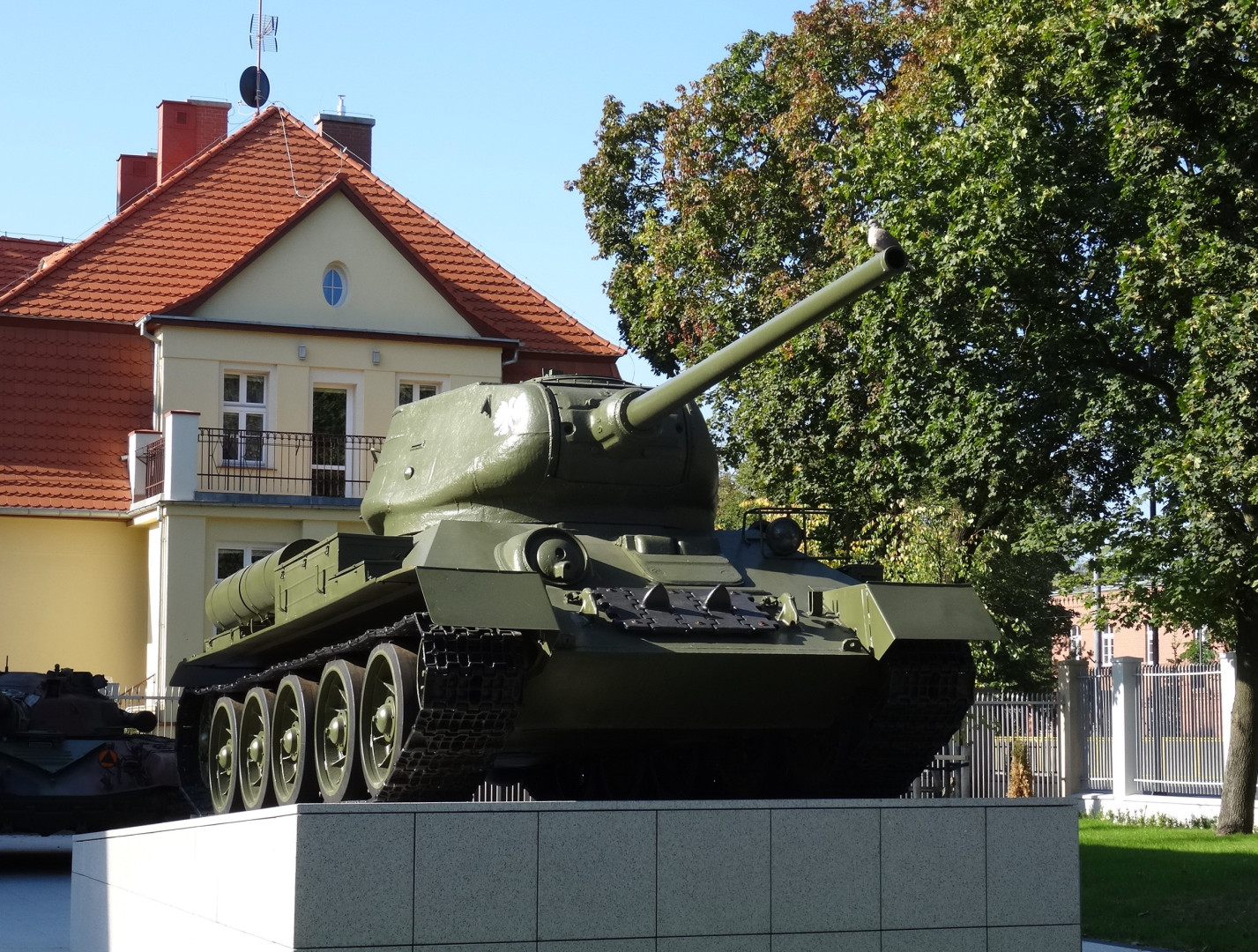 Muzeum Wojsk Lądowych w Bydgoszczy - ekspozycja zewnętrzna